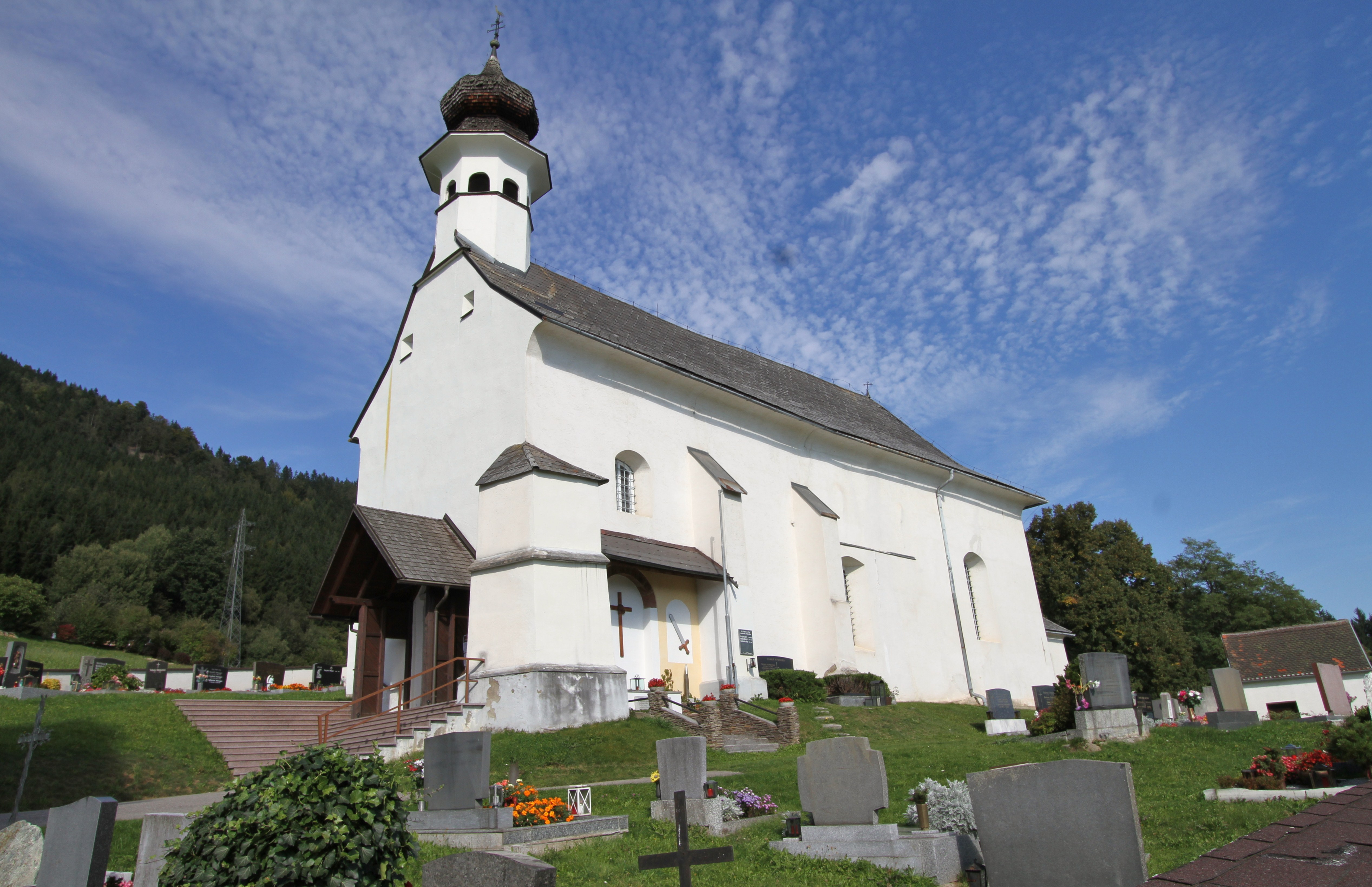 Kath. Pfarrkirche hl. Stephan, Friedhof